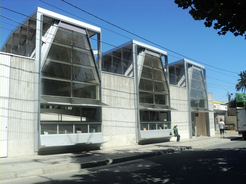 Nueva Biblioteca Municipal de Constitución (Chile)